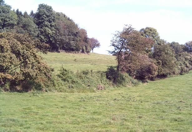 Limburgs: Graaf tösje Ulvend en Sint-Martens-Voeren